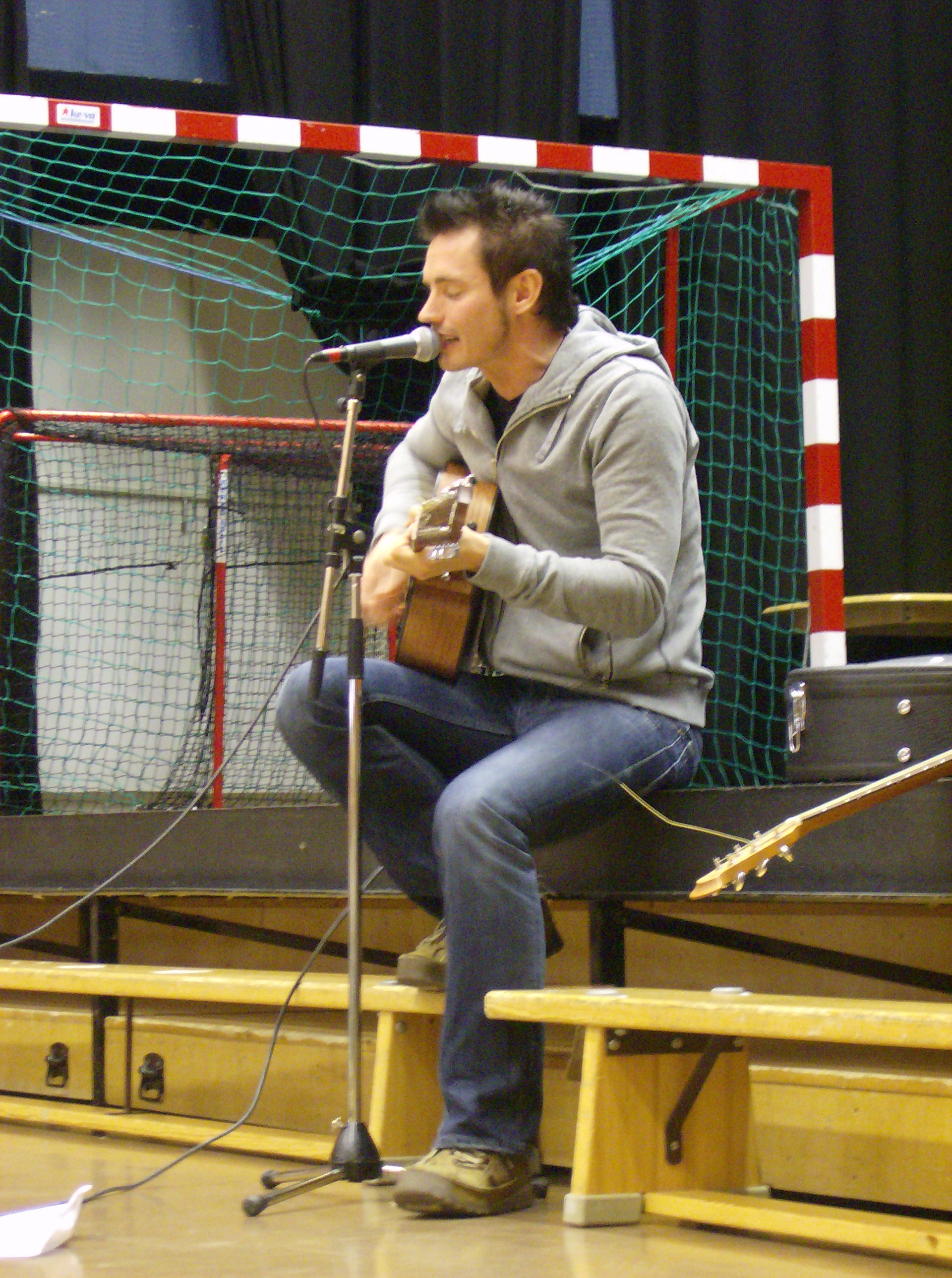 Lauri Tähkä Kauhavalla 2007